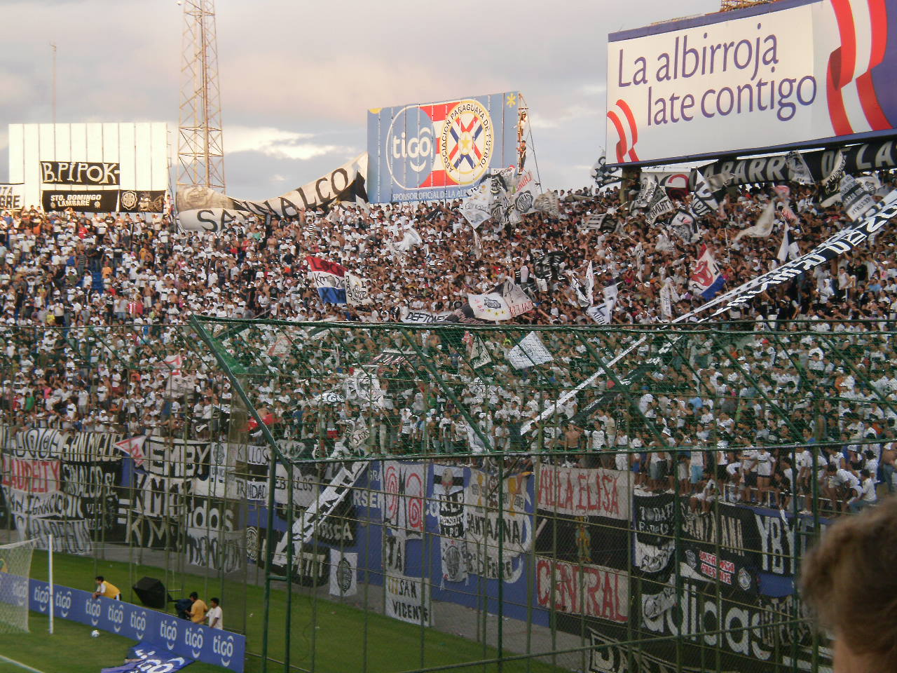 Hinchada de Olimpia de Paraguay sobre la parte sur del estadio Defensores del Chaco durante el partido entre su equipo y el 3 de Febrero, que ganó el primero por 3:1, en el marco de la fecha #11 del torneo Apertura paraguayo.